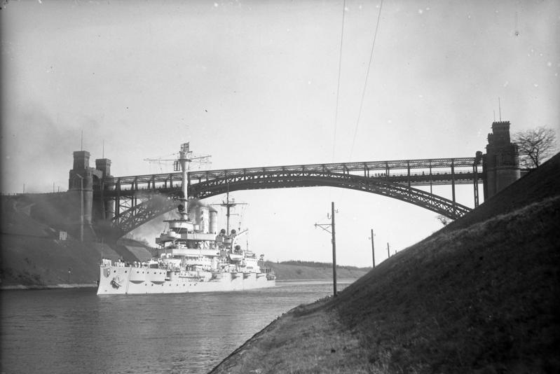 Die ersten grossen diesjährigen Manöver unserer Reichsmarine in der Ostsee ! Malerische Aufnahme des deutschen Linienschiffes "Schleswig-Holstein" bei seiner Fahrt durch den Kaiser Wilhelm-Kanal zu den Flottenmanövern.